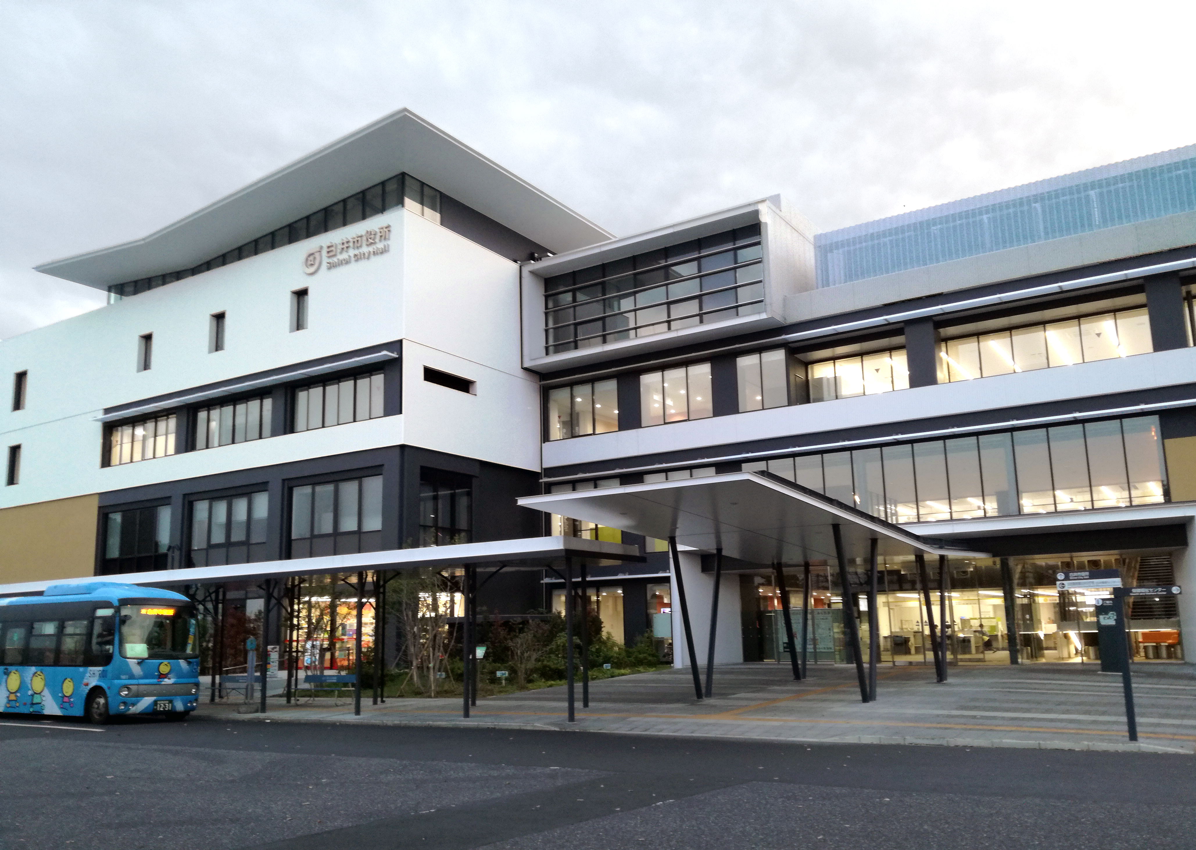 白井市役所、千葉県、日本